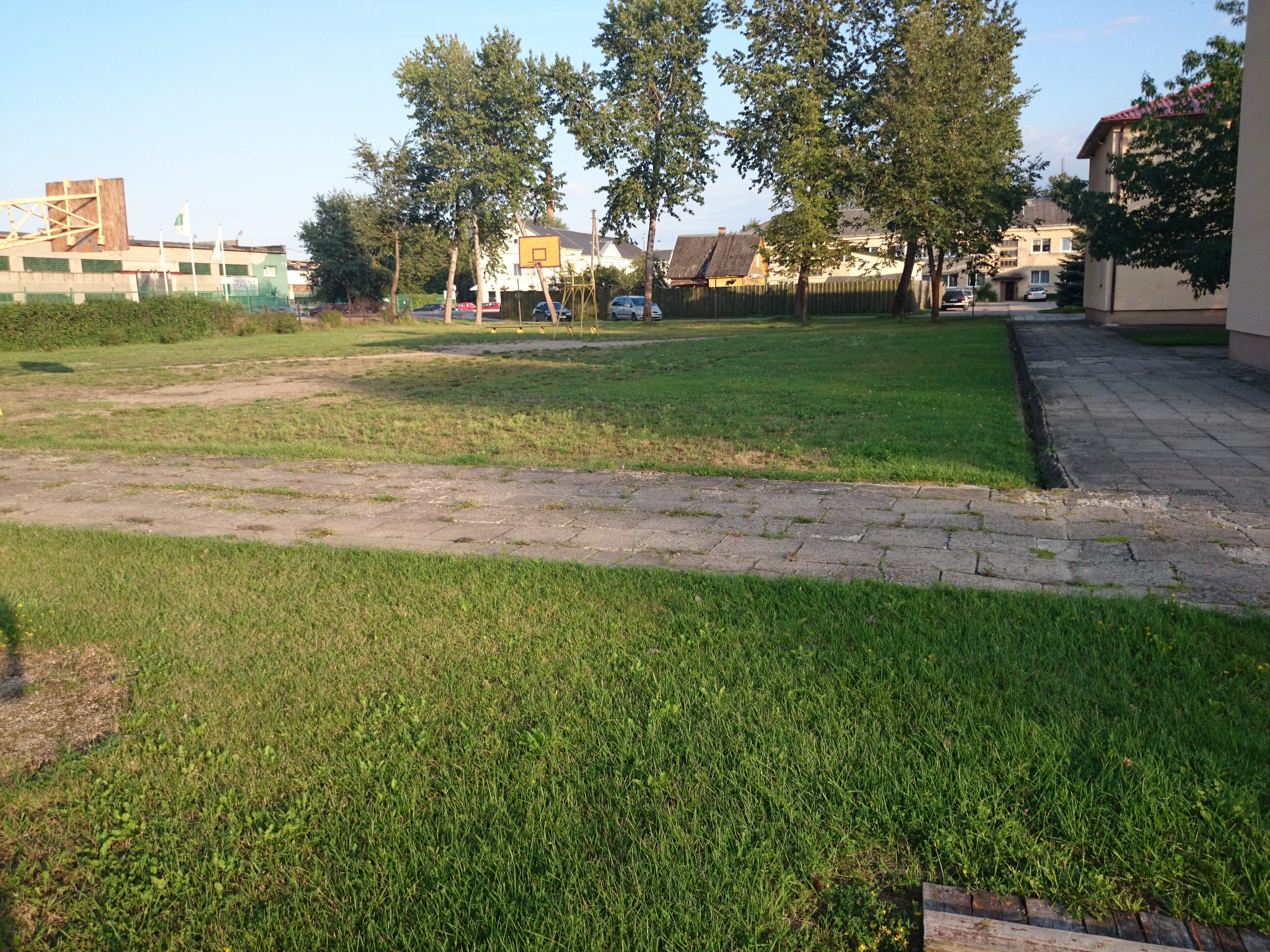 Lietavos pagrindinė mokykla